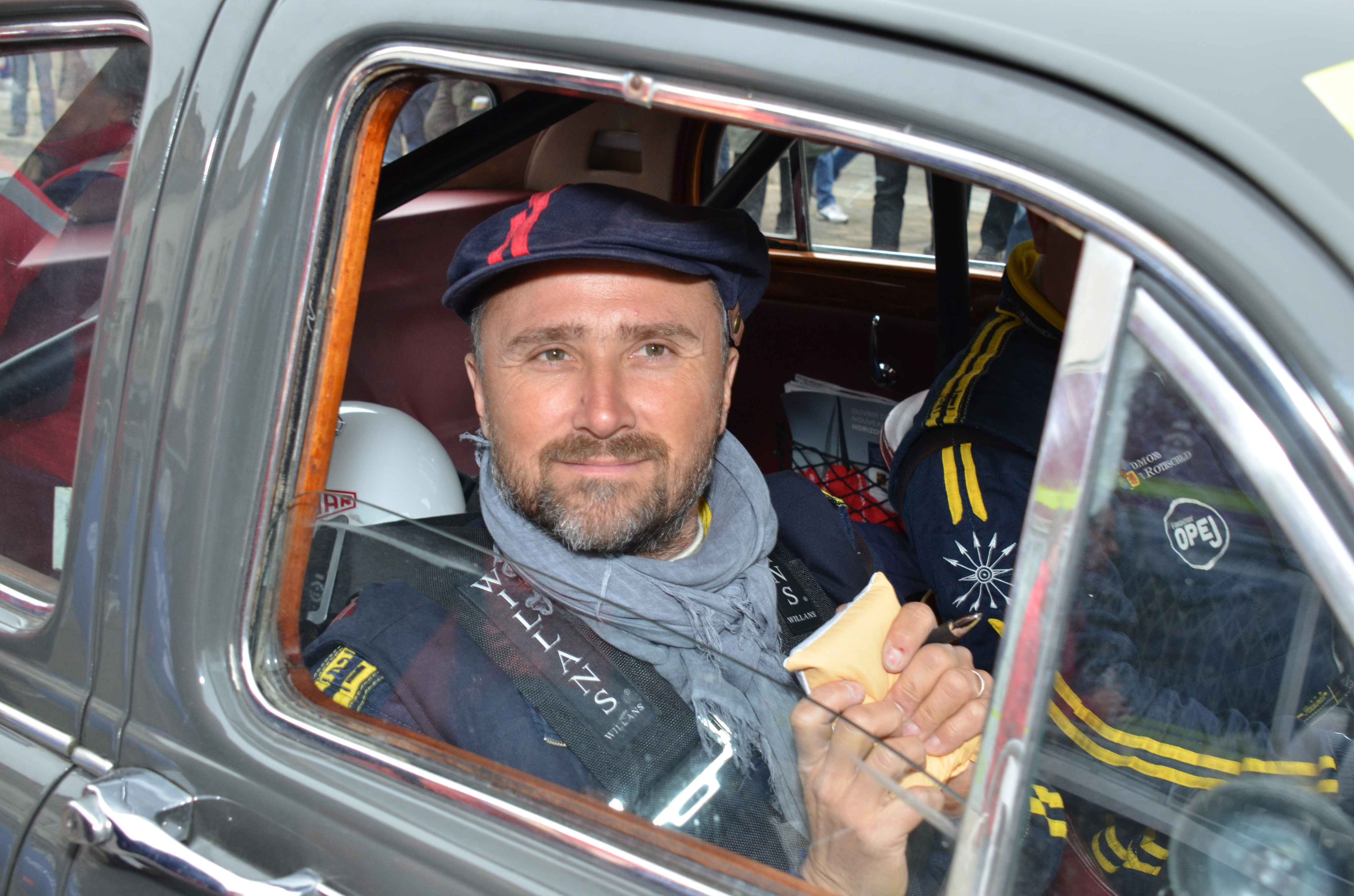 Alexandre Brasseur à Brou en 2017 lors du Tour Auto Optic 2000